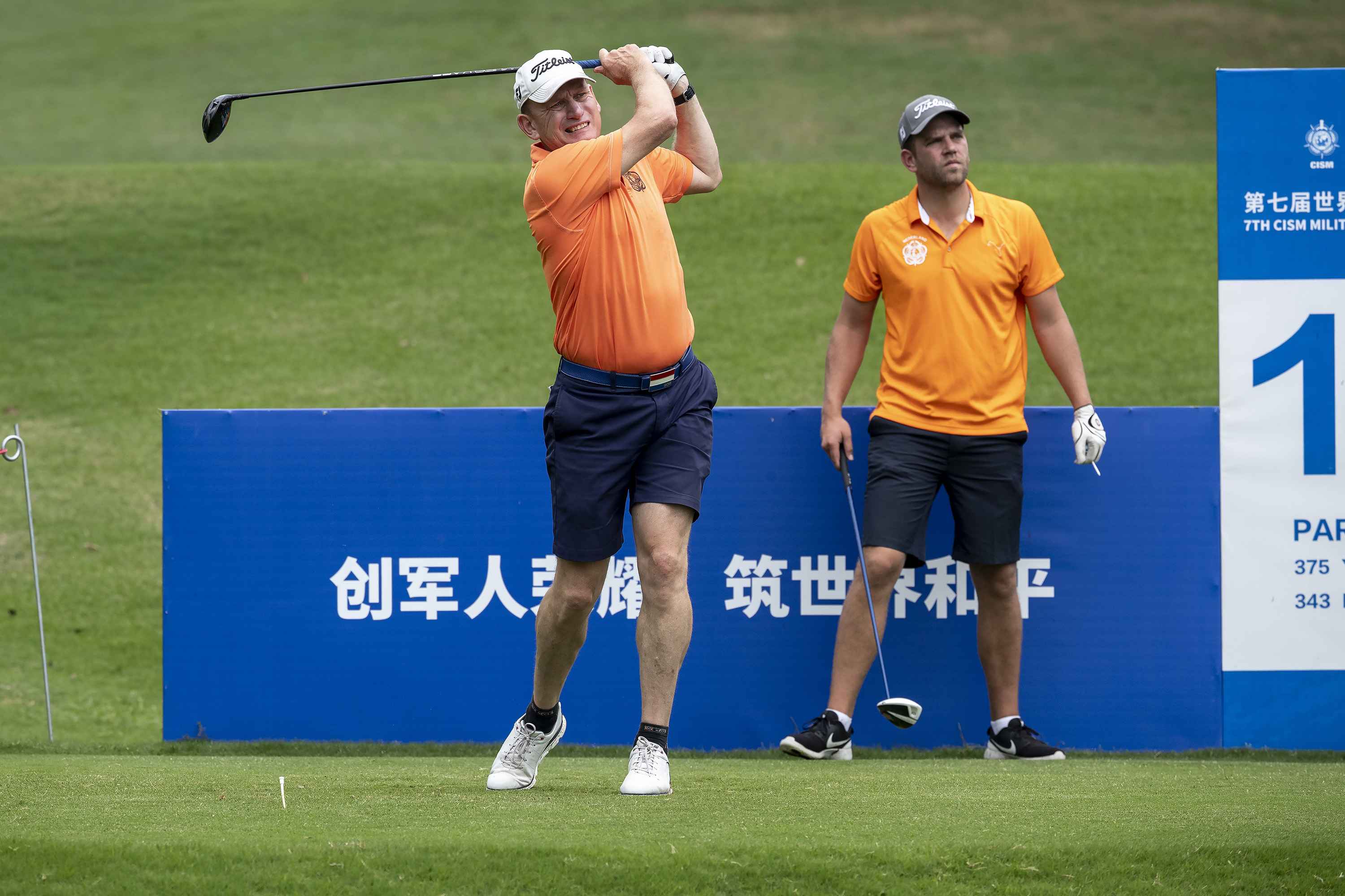 China, Wuhan, 23 oktober 2019.Militaire wereldspelen in China, van 17 tot 29 oktober.Ongeveer 10.000 atleten uit 105 landen (onder wie ca 160 Nederlanders) nemen deel aan dit evenement.Foto: Finale golf mannen.